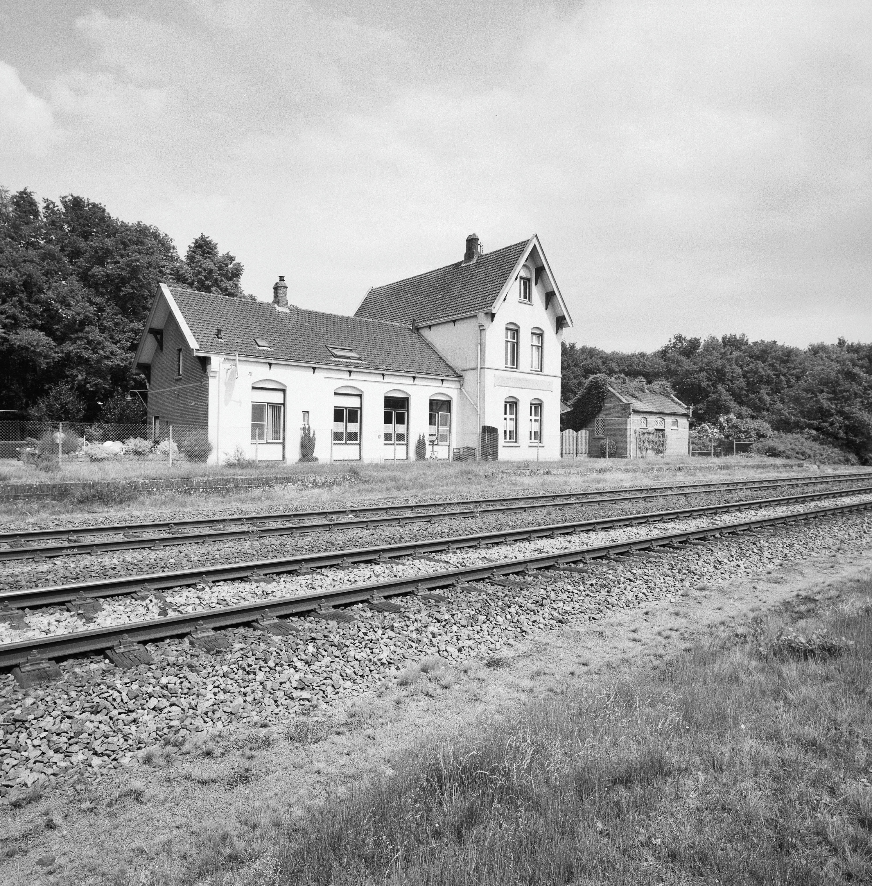 Voormalig Station Meerlo-Tienray: Overzicht achtergevel, gevel aan de spoorzijde, en rechter zijgevel (opmerking: Gefotografeerd voor Monumenten In Nederland Limburg, bladzijde 33)